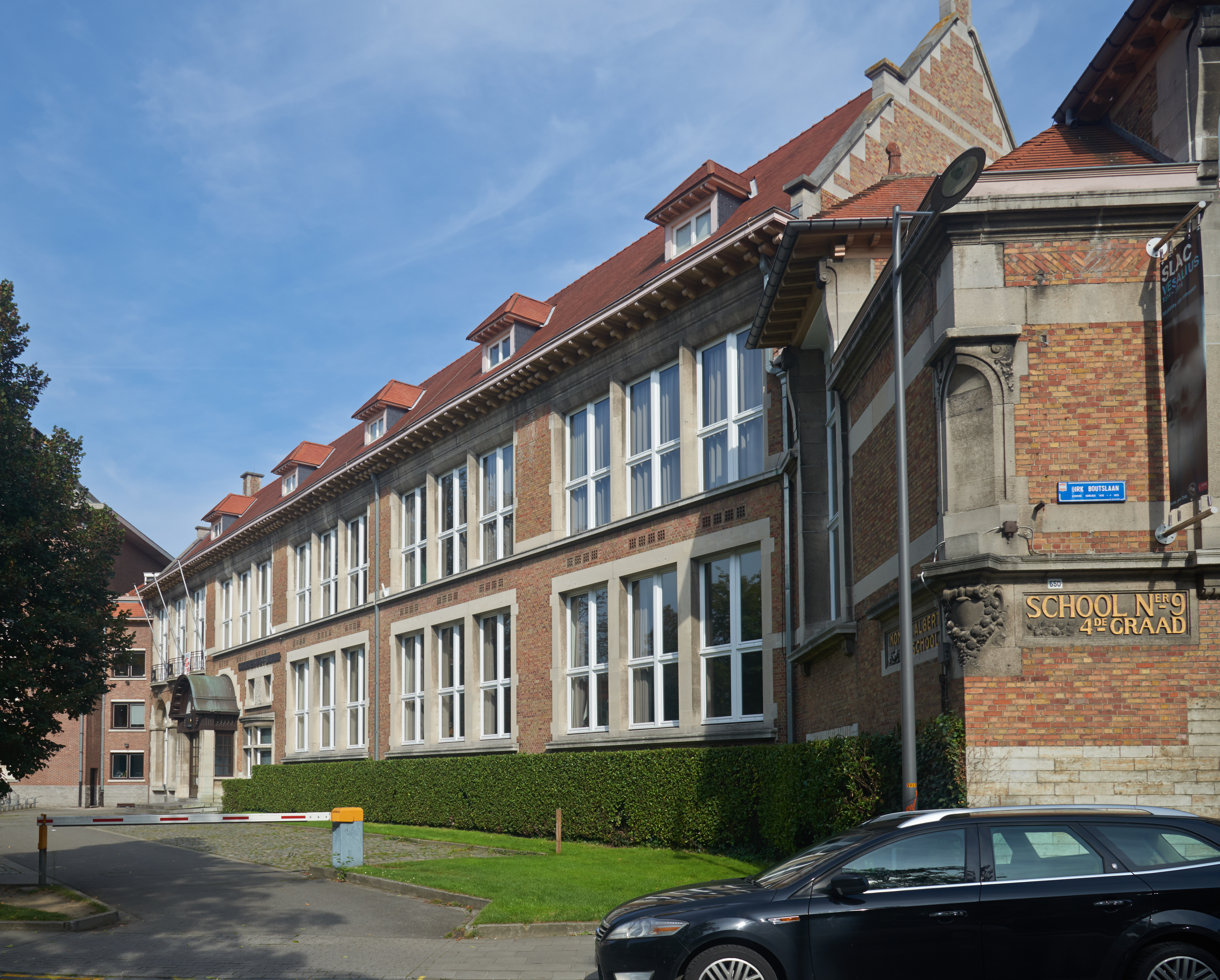 Leuven, Dirk Boutslaan 60, conservatorium